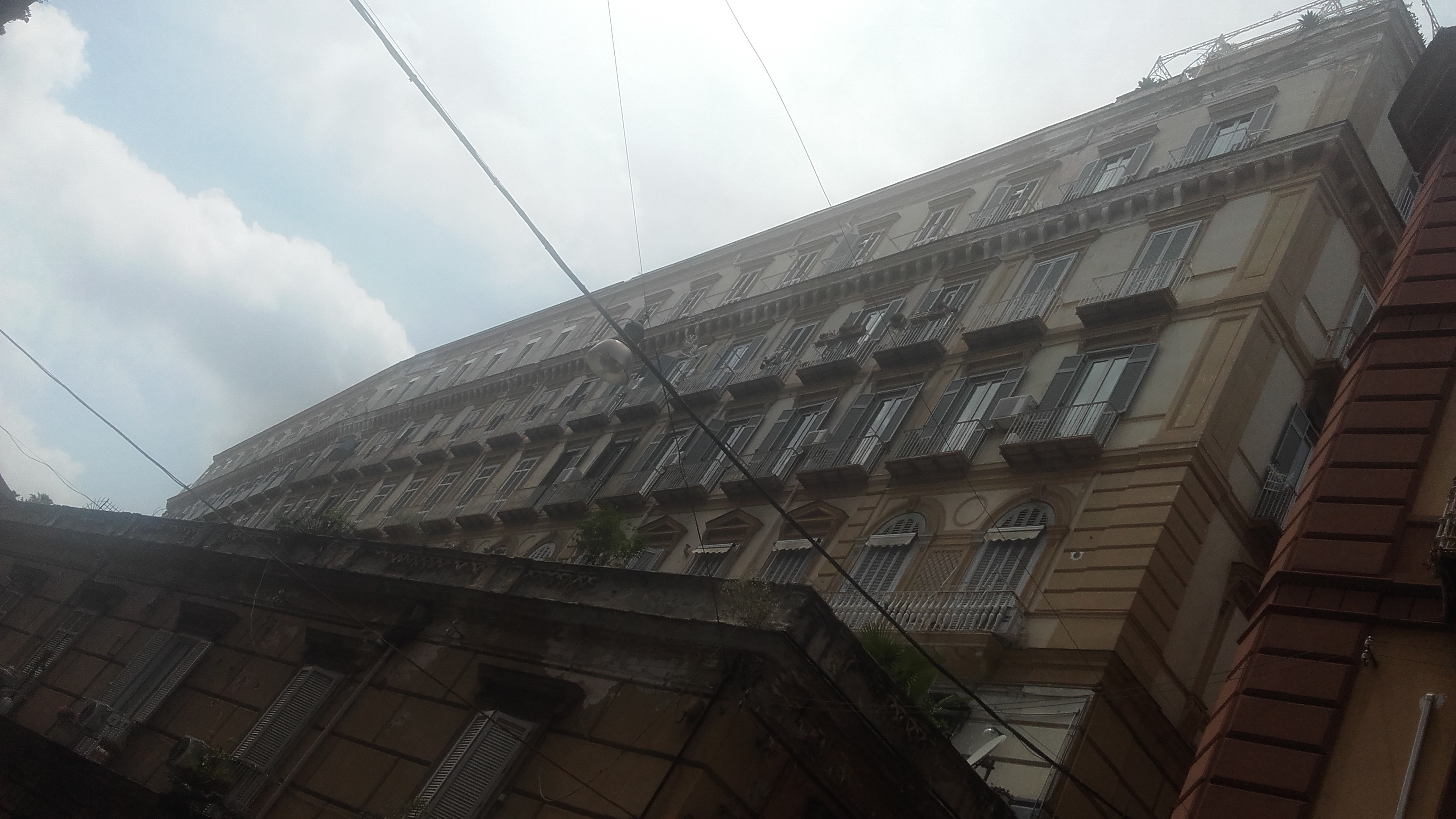 Palazzo dell'800 dall'impianto complesso.